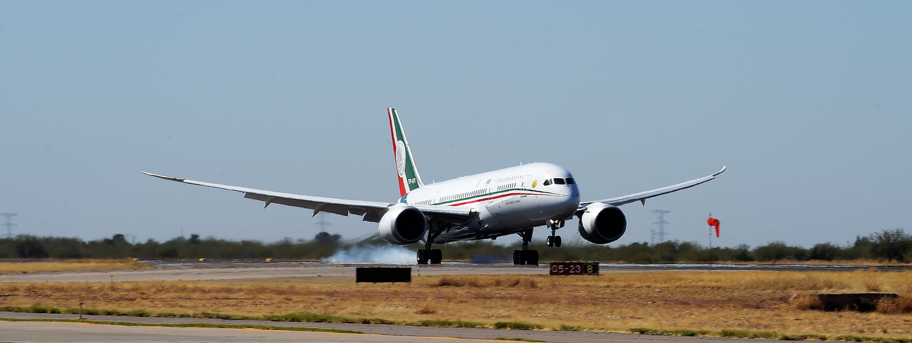 Hoy, en el 101 Aniversario de la Fuerza Aérea Mexicana, reconocemos su esfuerzo para asegurar la libertad, la paz y la prosperidad de los mexicanos 10 de Febrero del 2016